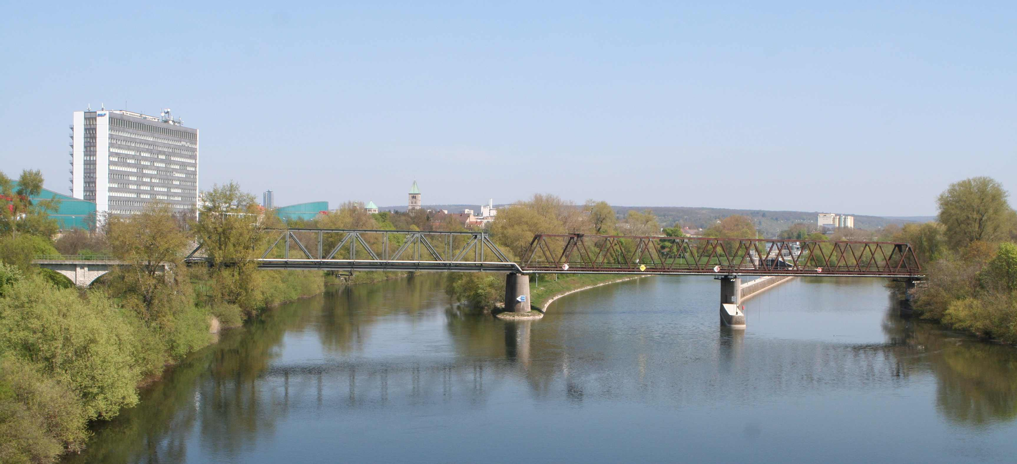 Mainbrücke Schweinfurt (Bahnstrecke Kitzingen–Schweinfurt)